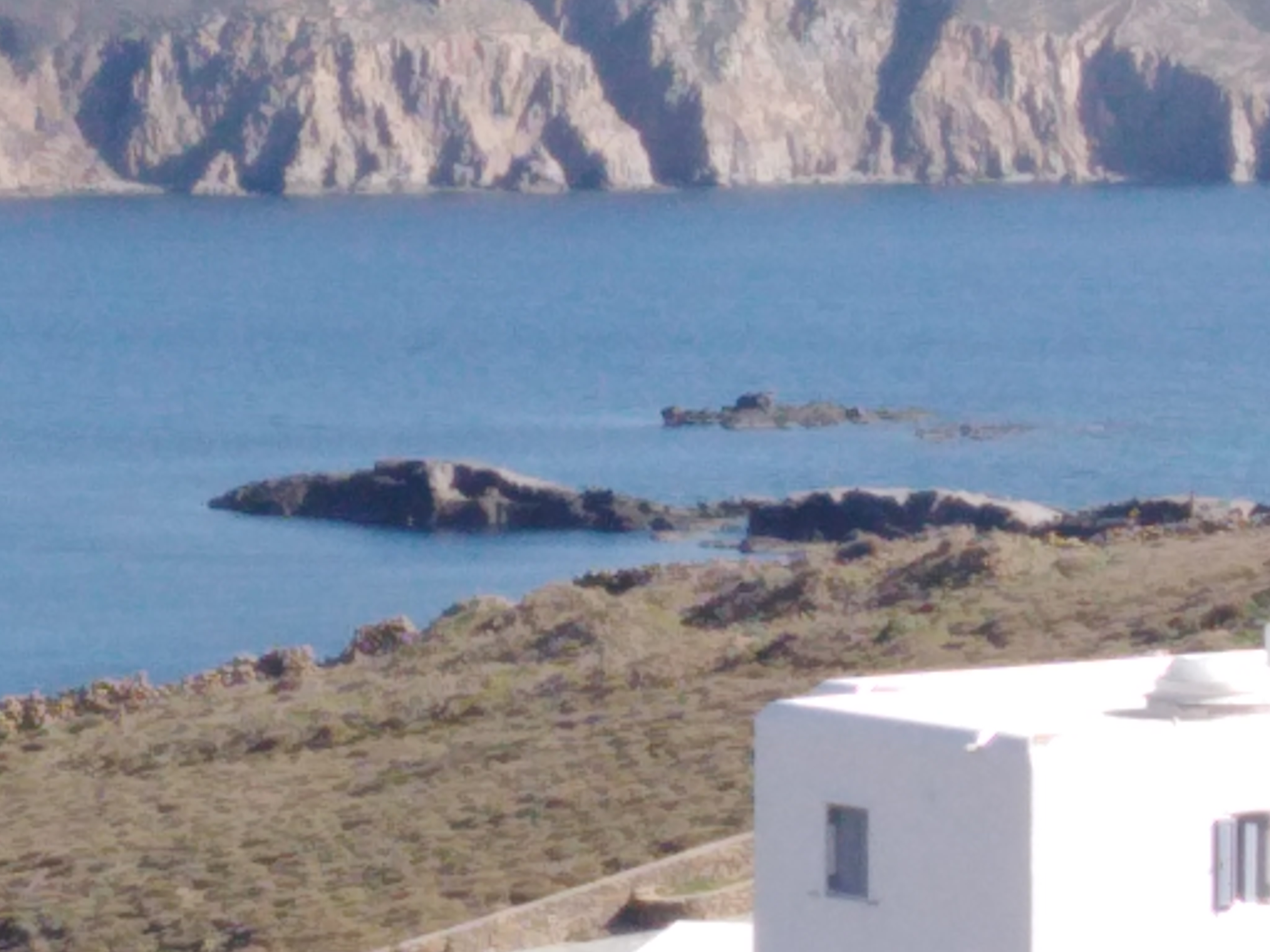 οι βραχονησίδες Μόλες στην Μύκονο